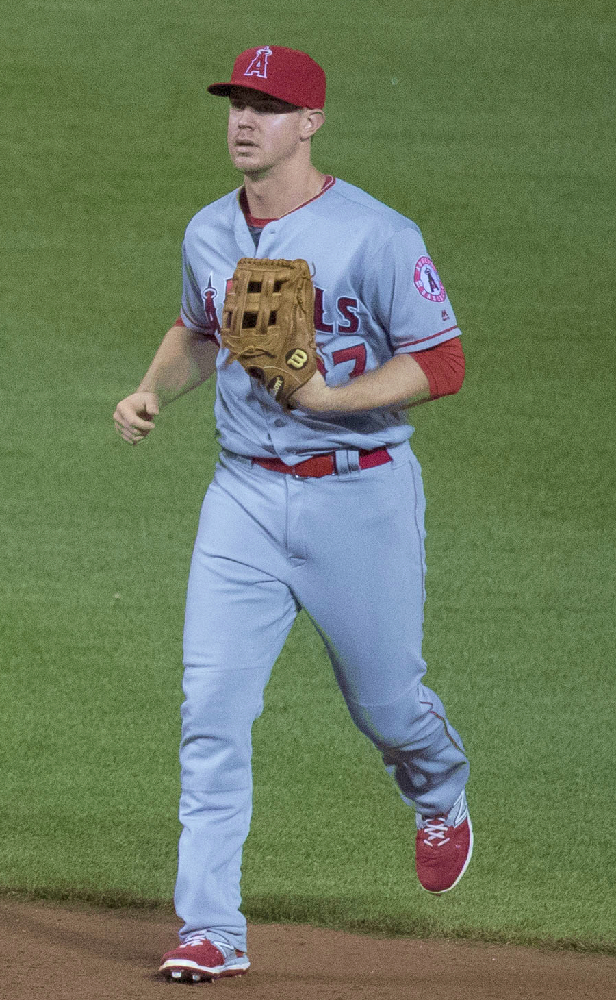 Todd Cunningham